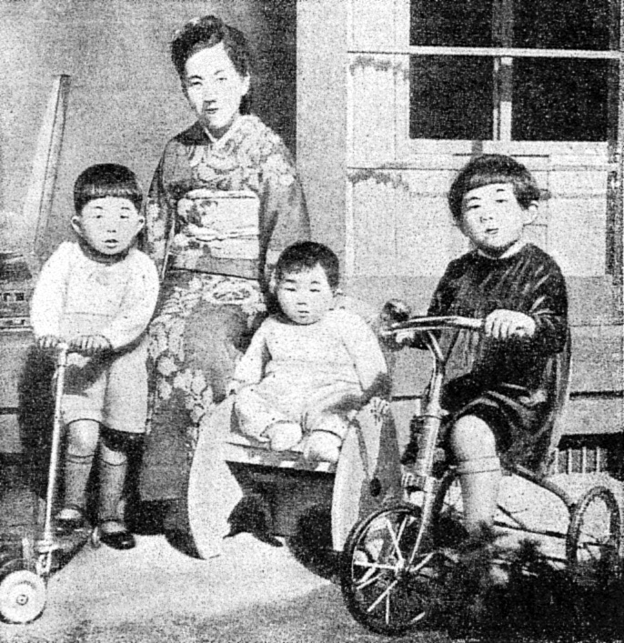 三笠宮妃百合子と、子供たち。左から、寬仁親王（Prince Tomohito）、百合子妃（Princess Yuriko）、宜仁親王（Prince Yoshihito）、甯子内親王（Princess Yasuko）